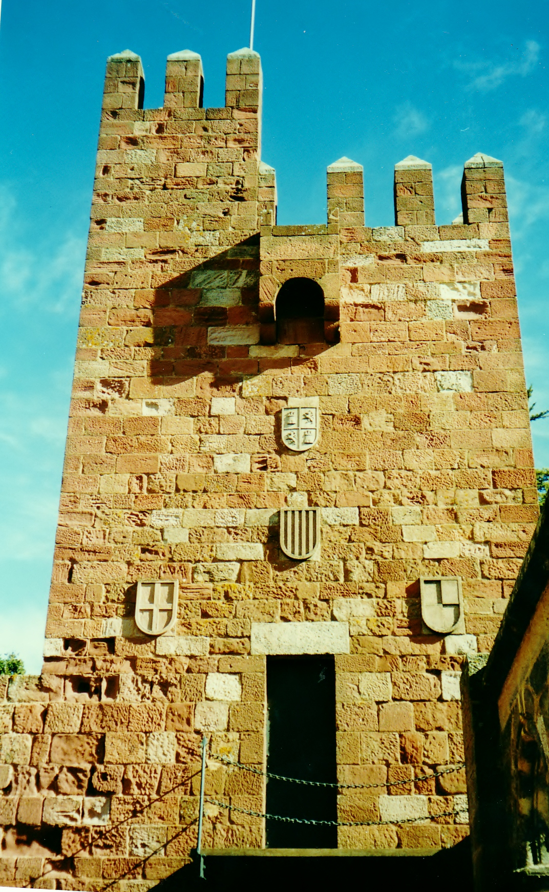 Castell monestir d'Escornalbou (Riudecanyes)